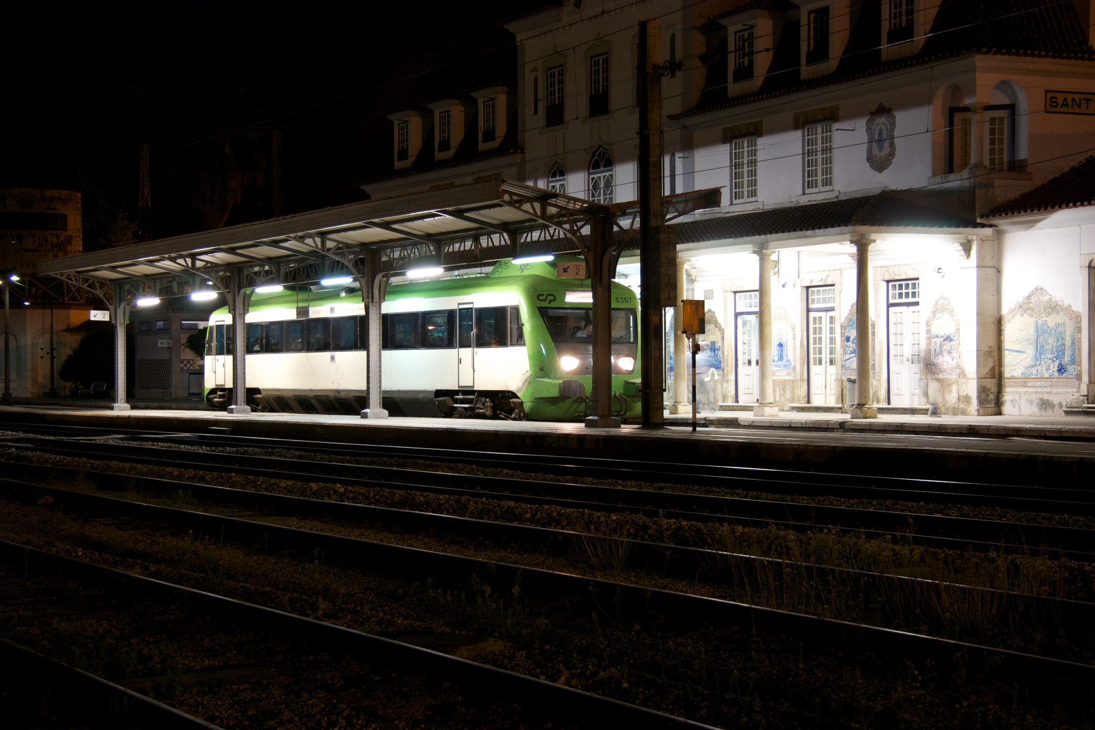 Tipo: Comboio Regional 4401 [Lisboa • Santa Apolónia - Entroncamento] Local: Estação de Santarém [Linha do Norte, PK 74] Data e hora: 30 de Setembro de 2012 [01h27] Material: Automotora 0367 [Unidade Simples Diesel - Allan Renovada] gravação-de-campo | field recording link. [PT] A automotora 0367, a efectuar o serviço Regional 4401 (entre Lisboa e o Entroncamento), apita e parte da Estação de Santarém. [ENG] A northbound regional train (a Diesel Single Unit railcar) from Lisbon to Entroncamento horns and departs from Santarém station.